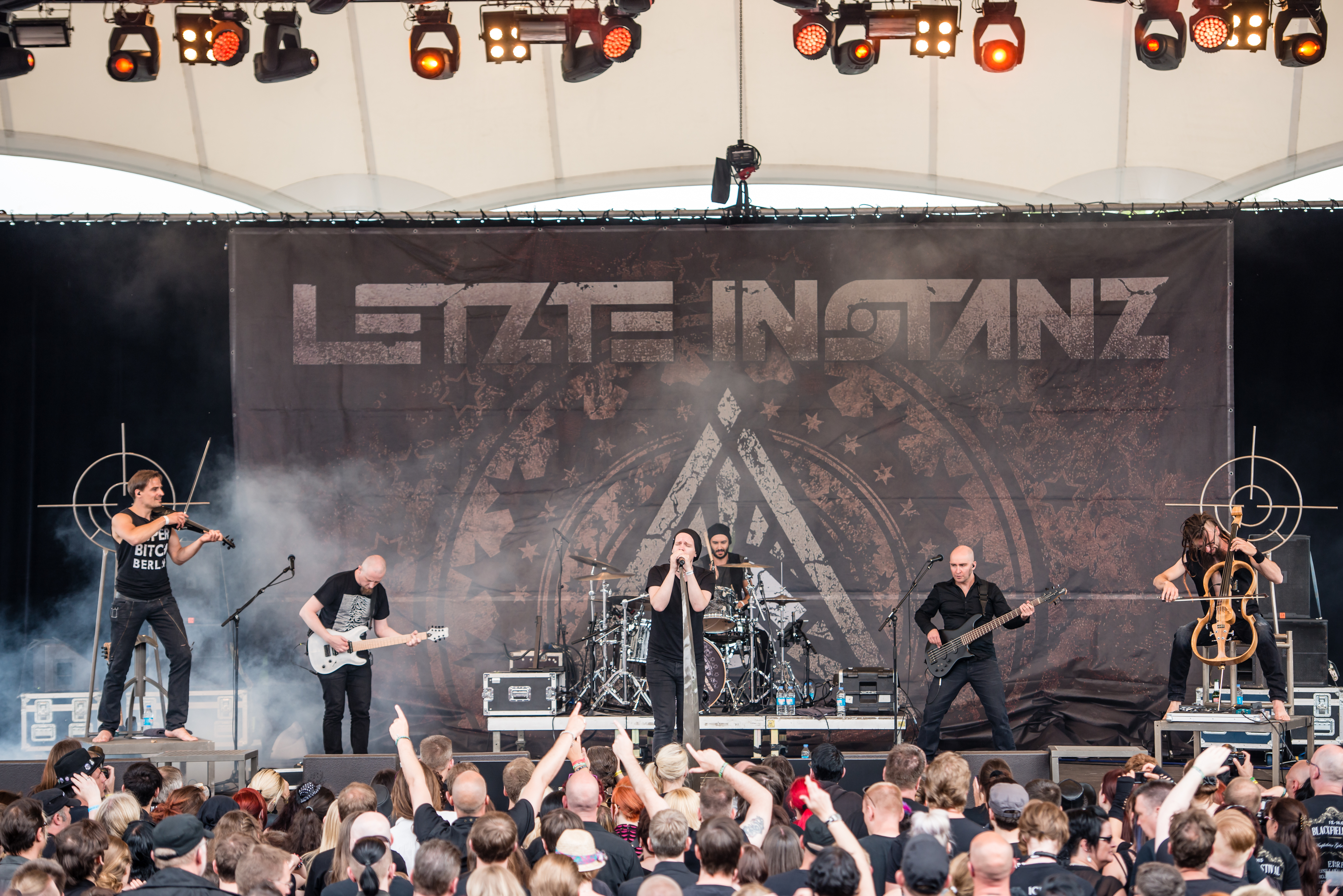 'Blackfield Festival 2015; Gelsenkirchen Amphitheater': 'Letzte Instanz'